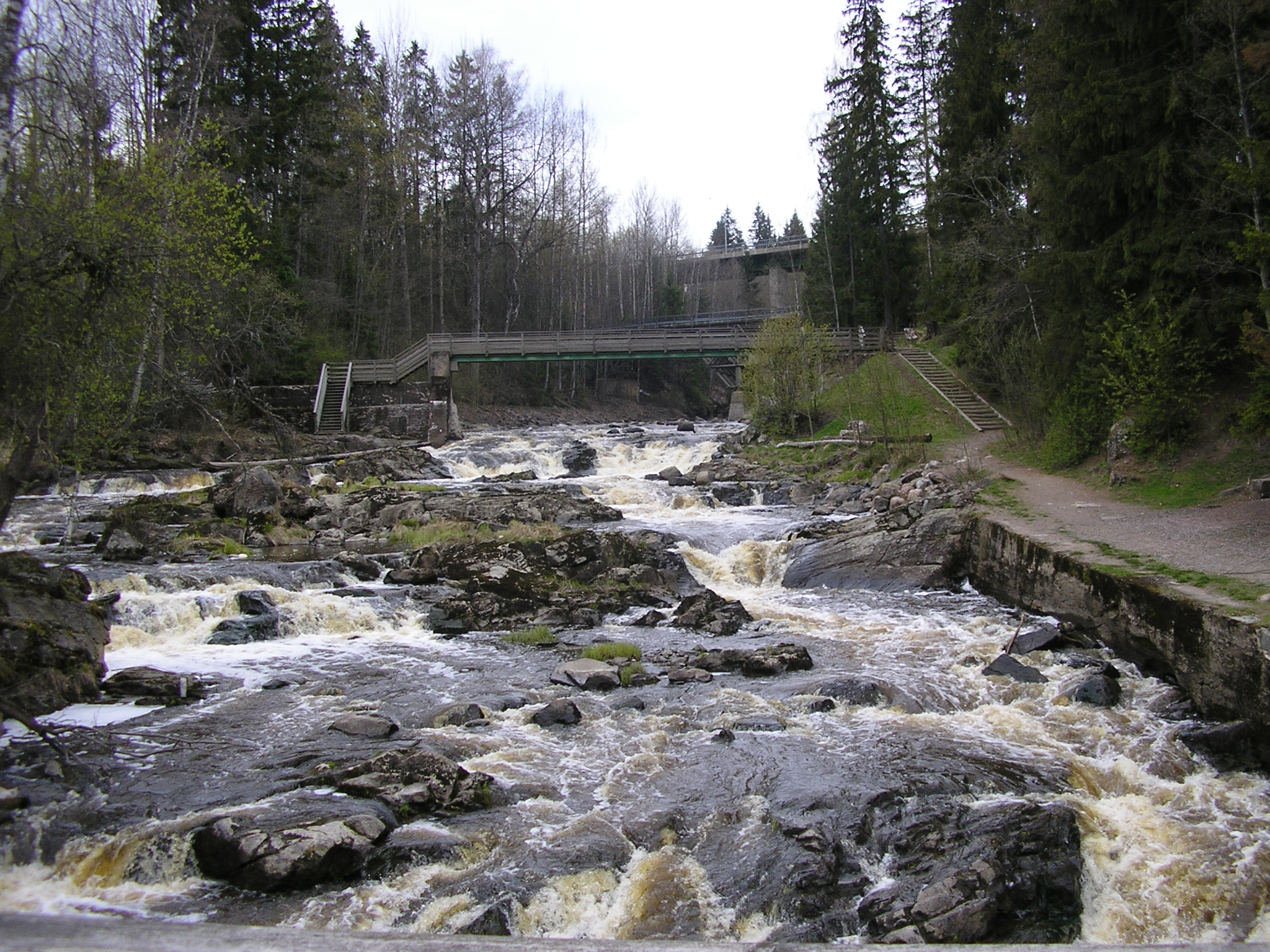 Myllykoski [05-2007]